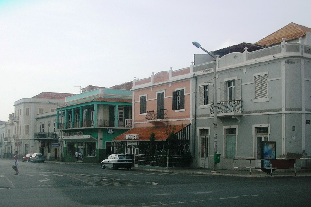 "Rua de Lisboa", main street in Mindelo town, São Vicente island, Cape Verde (Die Straße heißt mittlerweile "Rua de Libertad d'Africa")